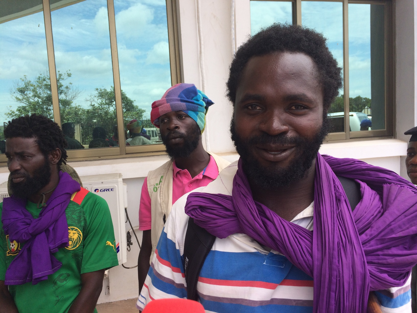 Des ex- rebelles Ninjas réclament leur réinsertion socio-économique, 20 juin 2019 à Kinkala, Congo-Brazzaville. (VOA/Arsène Séverin)